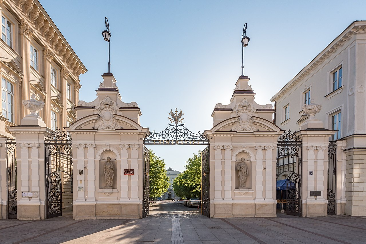 Warszawa, ul. Krakowskie Przedmieście 26, 28